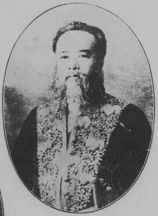 丸山作楽（1840-1899）